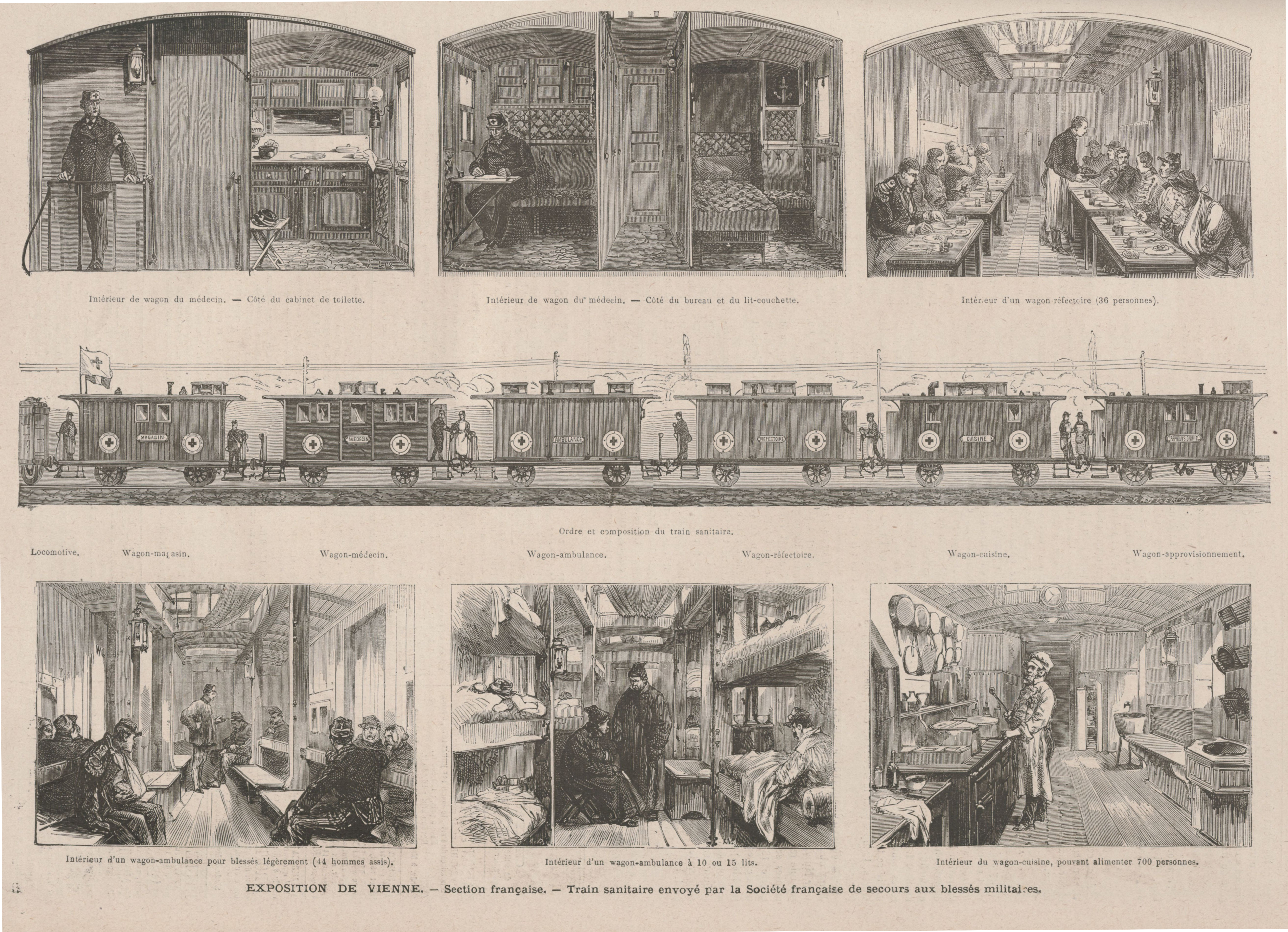 Gravure d'un train sanitaire de la Société française de secours aux blessés militaires, à l'exposition de Vienne, parue dans l'édition du 28 juin 1873 du Monde illustré.